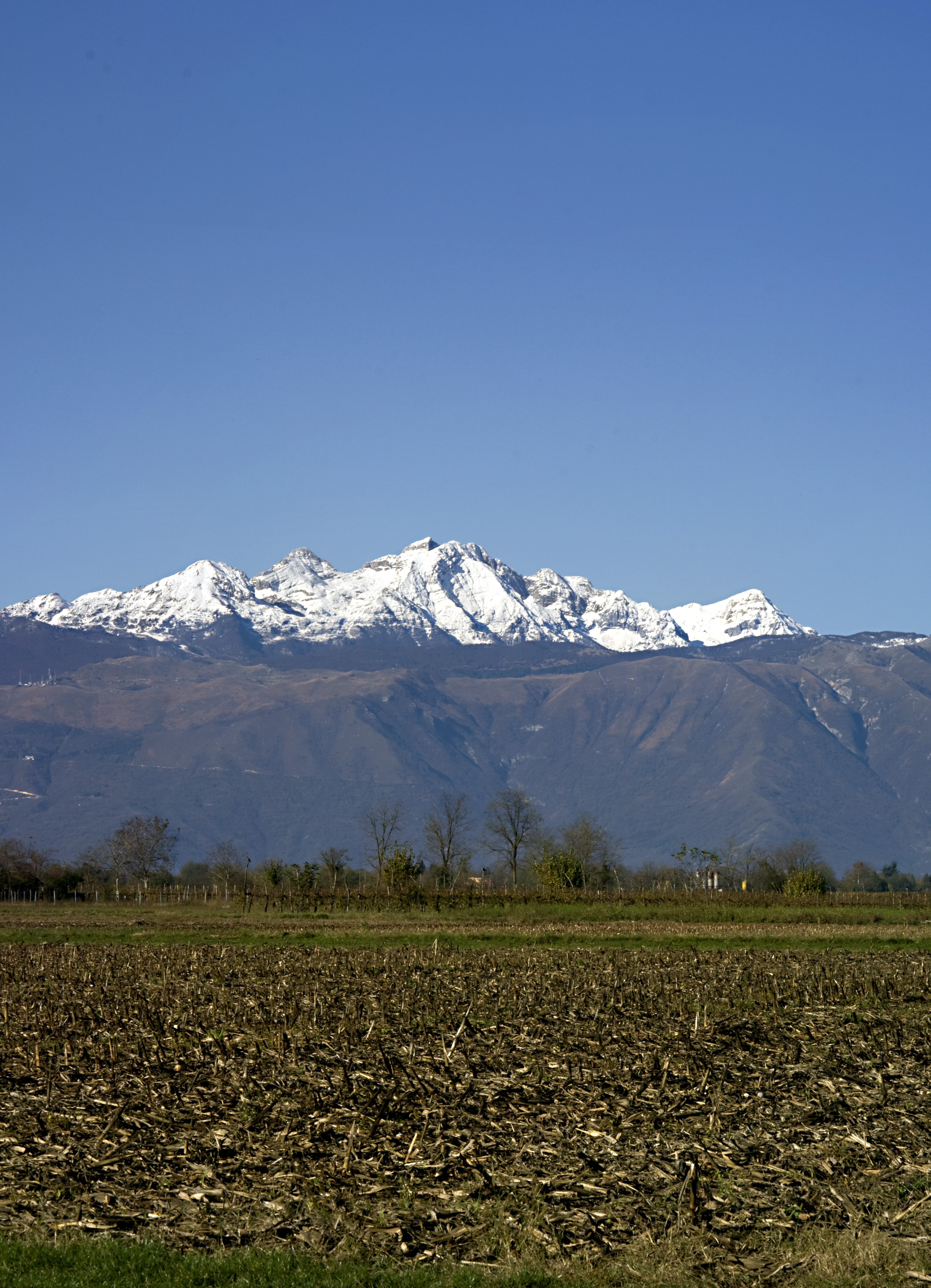 vista dalla campagna di Cordenons